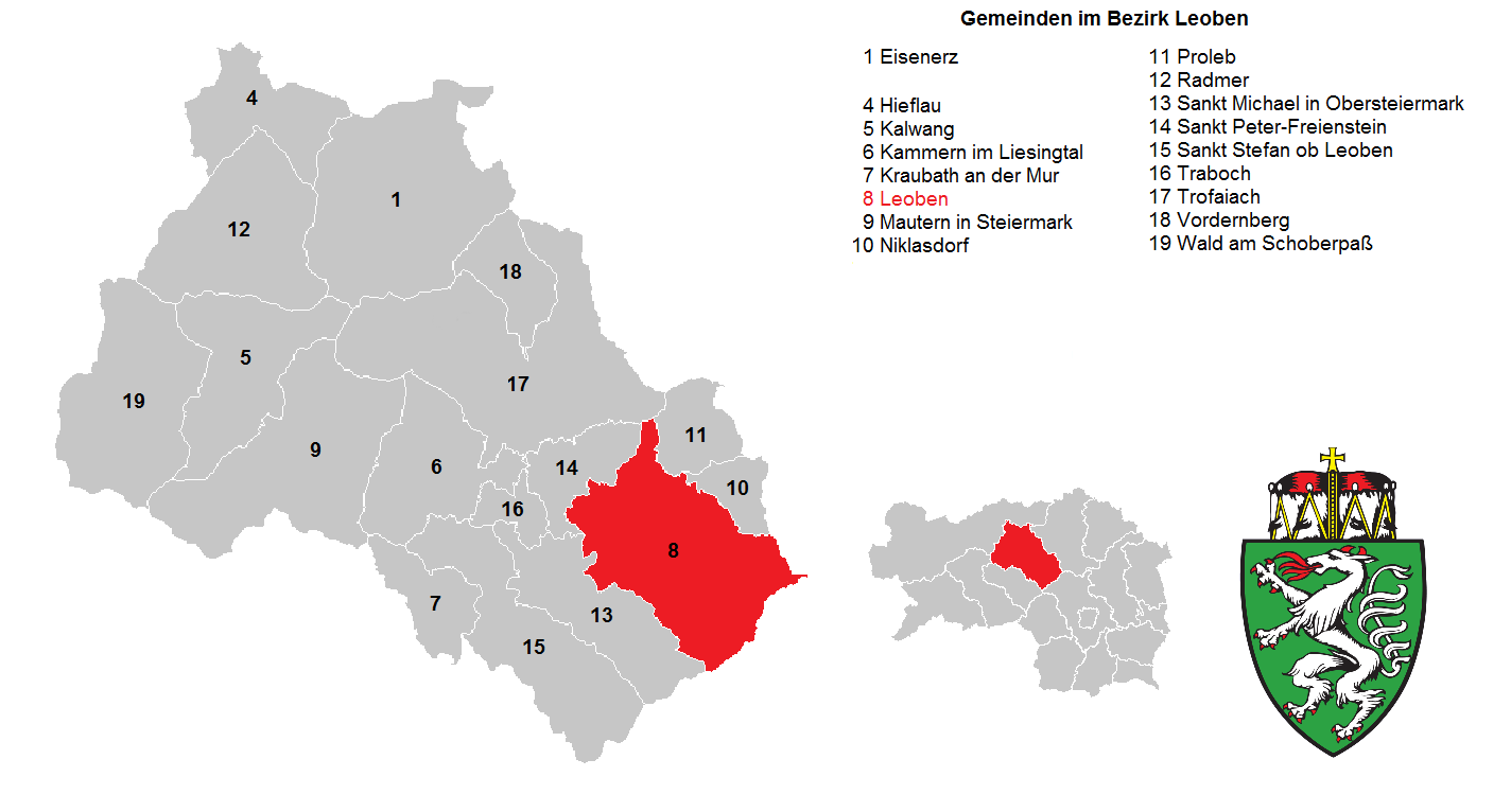 Bezirk Leoben